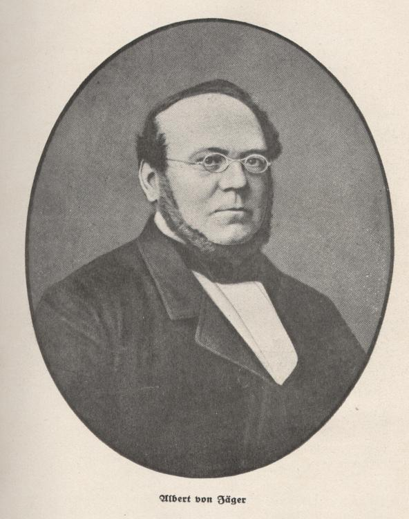 Albert von Jäger (1814-1887) Bay. Regierungsrat und Direktor der Pfälz. Eisenbahnen; Foto aus der Biografie von Jakob Knauber, 1925